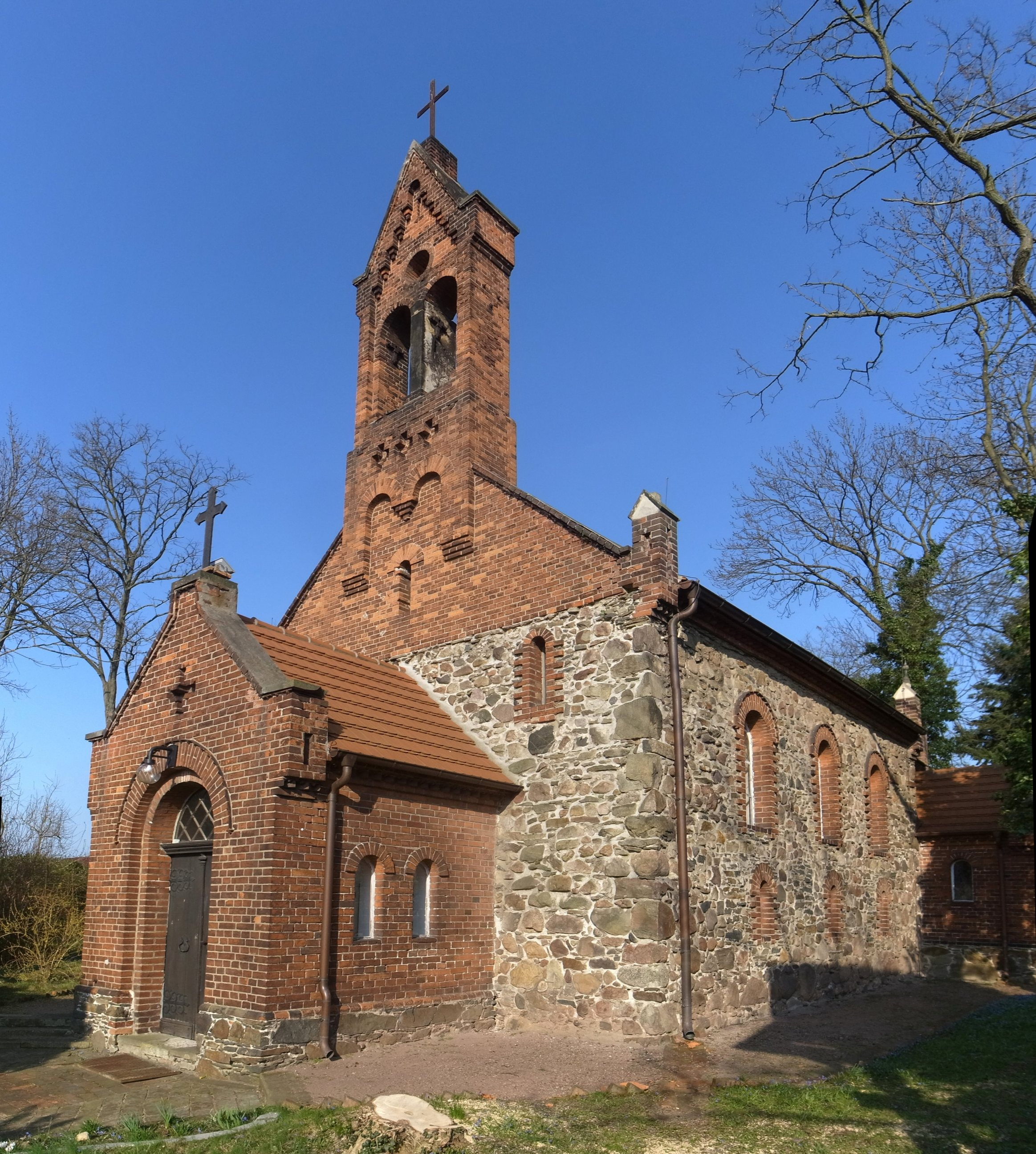 Möhlau, Kirche